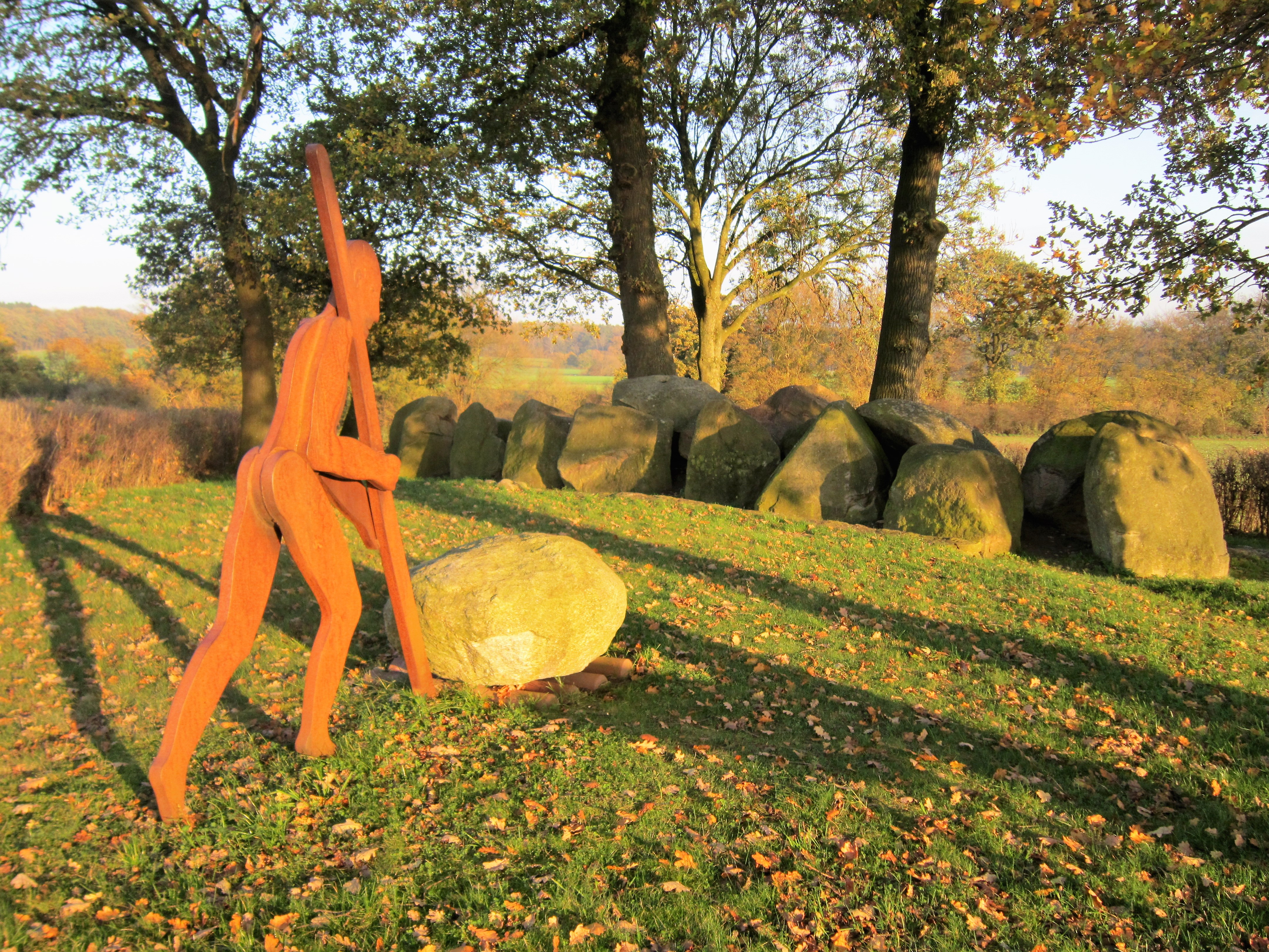 Jeggener Steine in Jeggen (Landkreis Osnabrück). Die Skulptur veranschaulicht die Art, wie die Steine transportiert wurden.